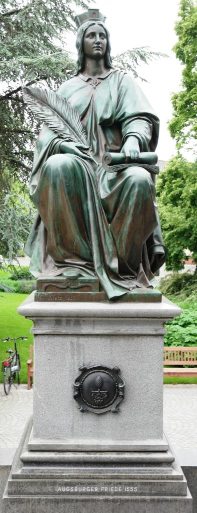 Allegorie Augsburger Reichs- und Religionsfrieden 1555 von Gustav Adolph Kietz, Teil des Lutherdenkmals in Worms